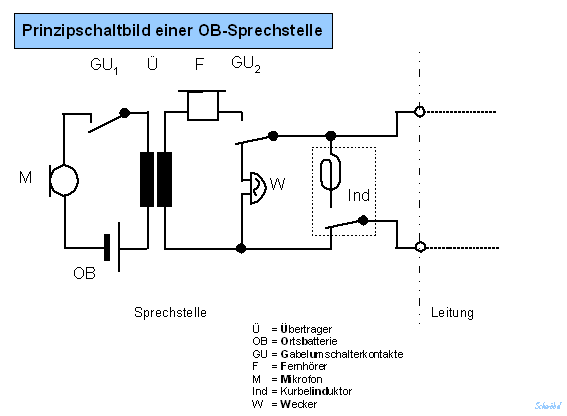 Prinzipschaltung des Ortsbatteriebetriebs